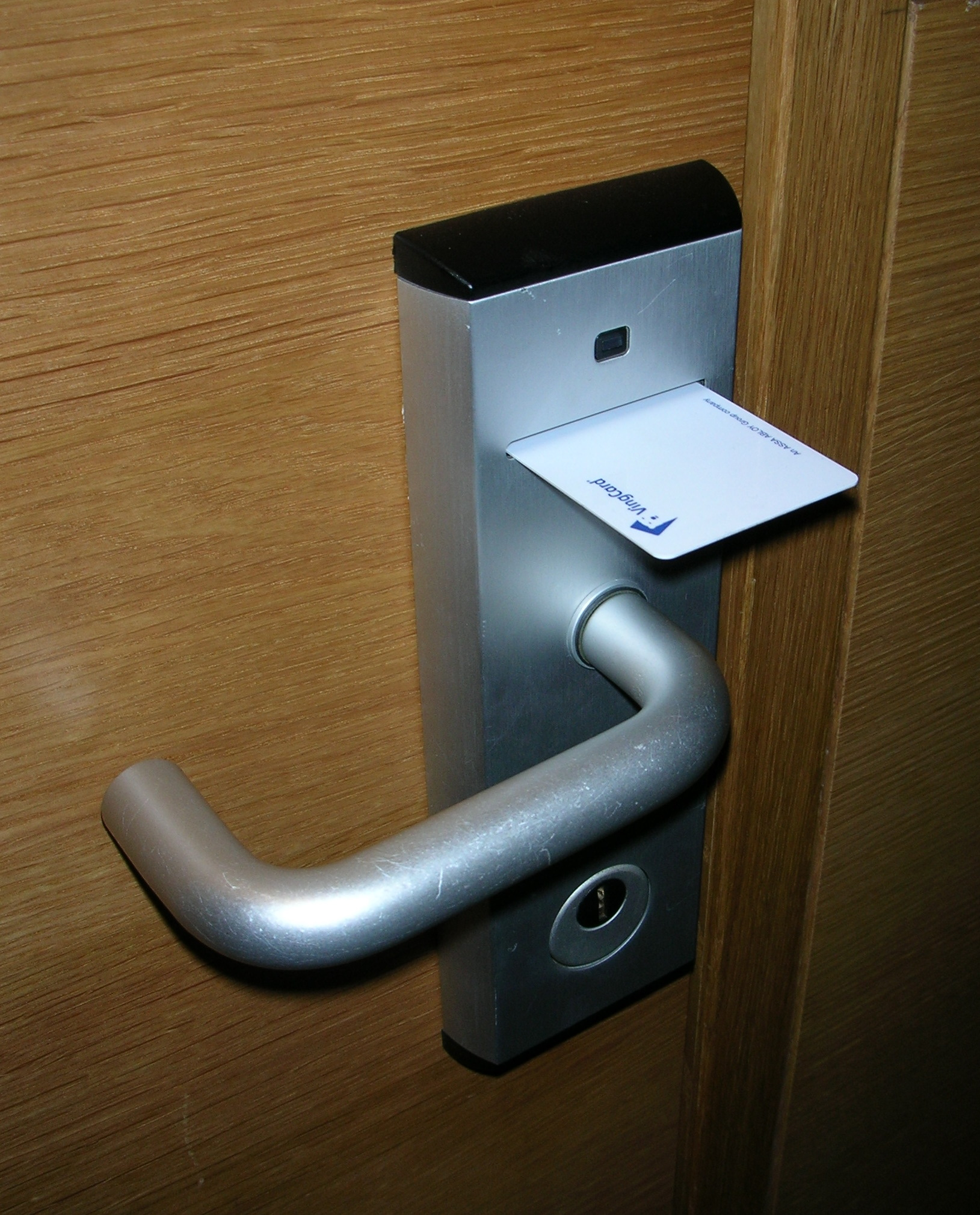 Rumsdörr, Rica Talk Hotel.